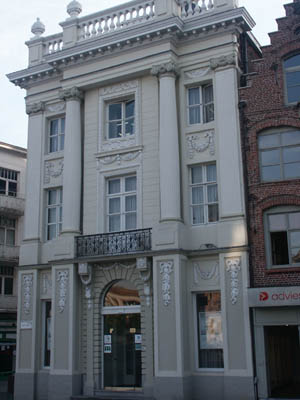 eigen foto